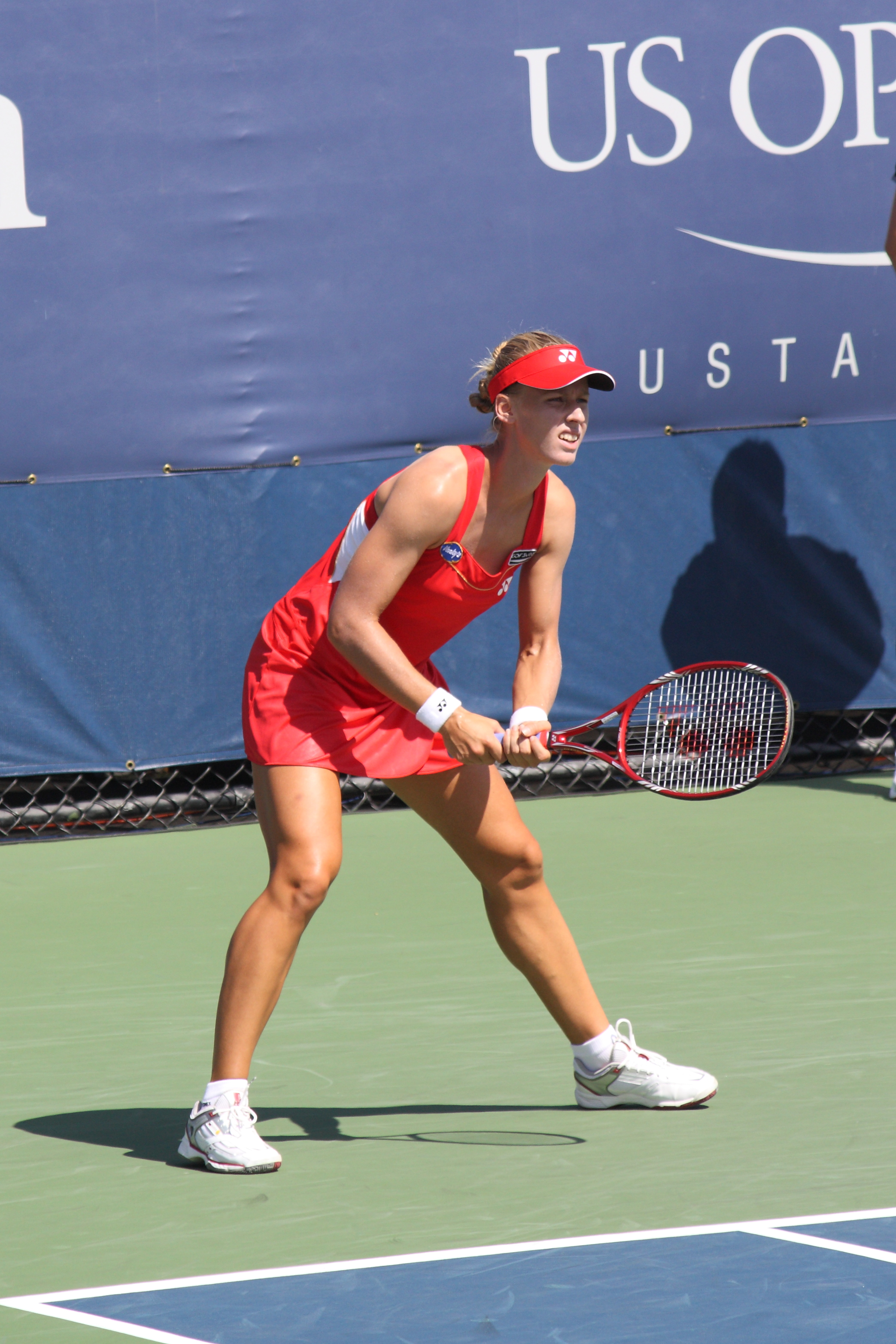 Elena Dementieva at US Open 2010. First Round Match vs Olga Govortsova